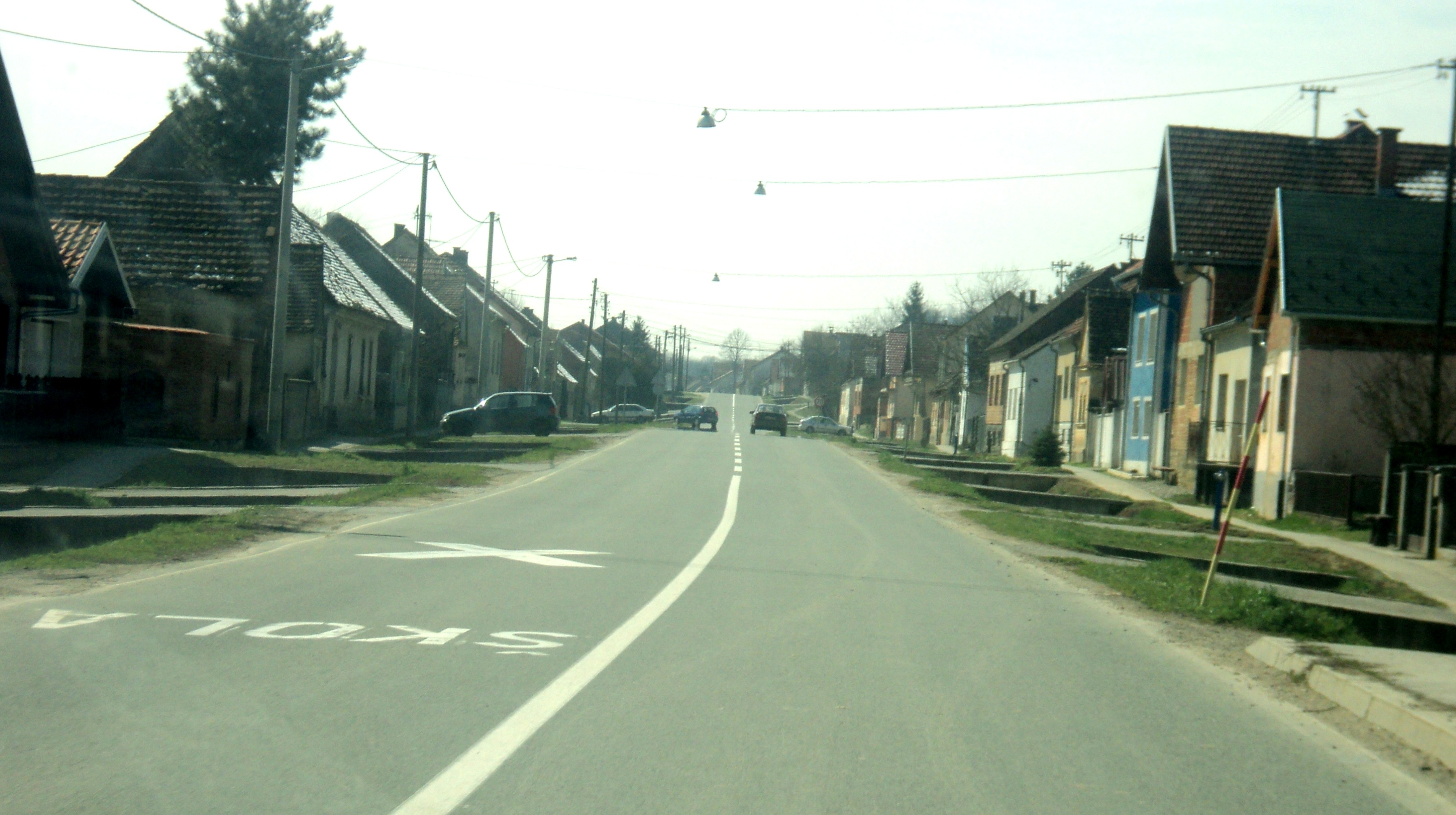 Dragovci kod Pleternice